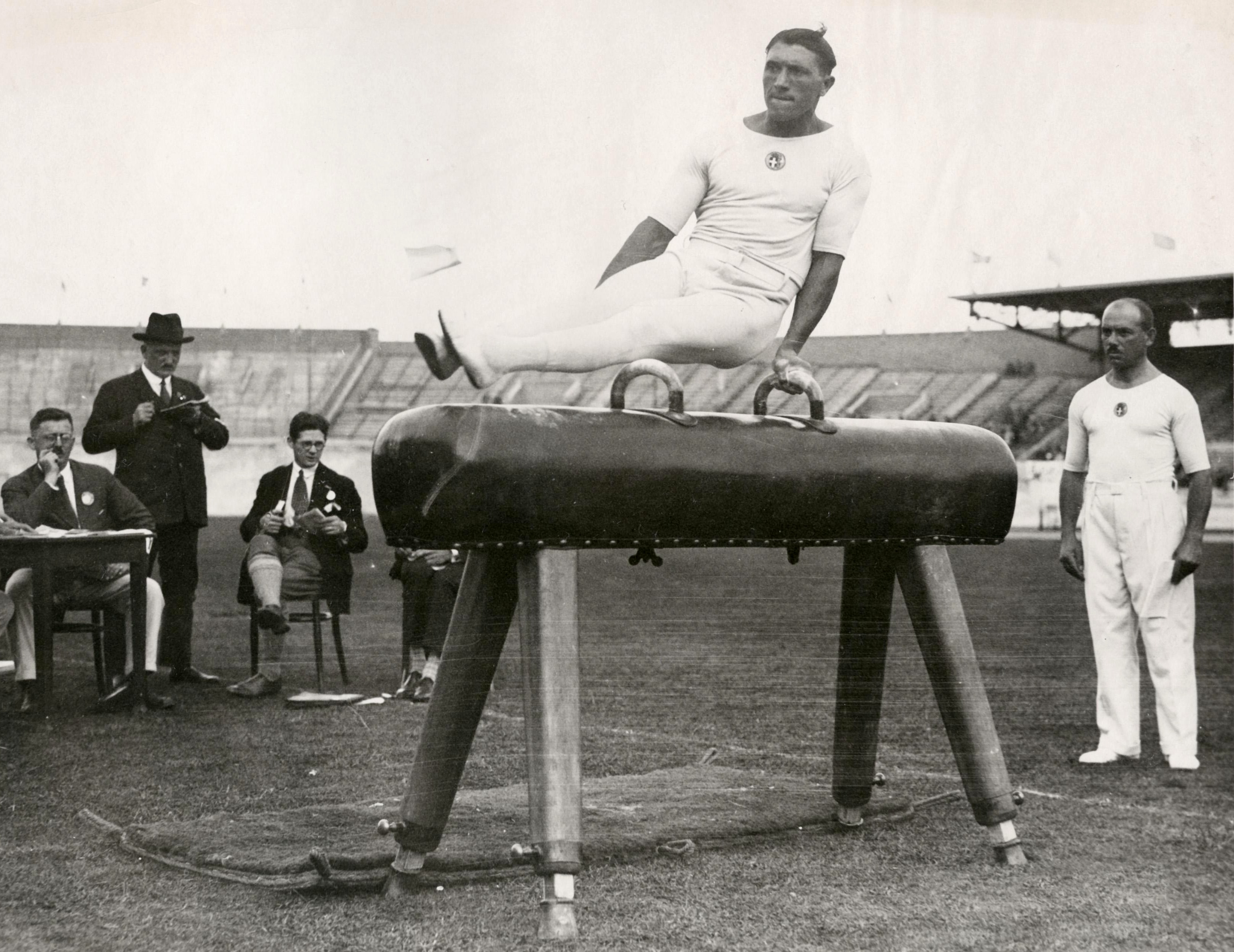 Sport, turnen. Olympische Spelen Amsterdam, 1928 : De Italiaan Romeo Neri bij het paardvoltigeren.